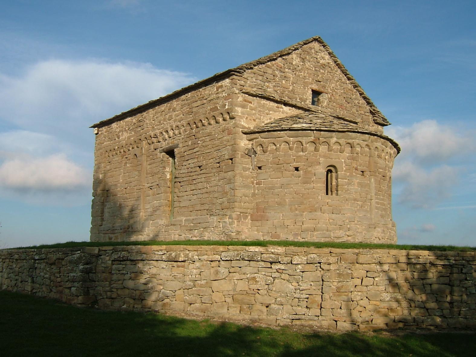 Bergolo CN, Capella di San Sebastiano